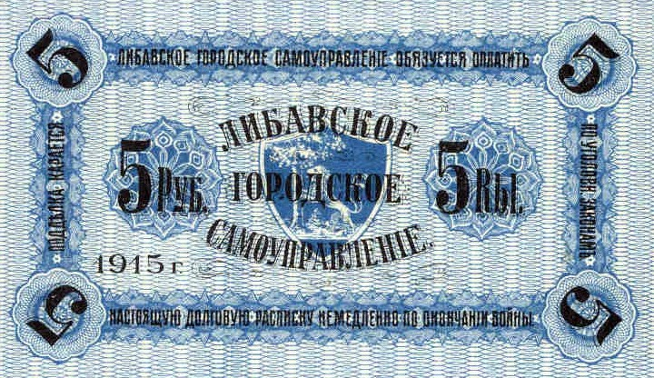 Долговая расписка города Либава на 5 рублей с надписью: Городское самоуправление обязуется оплатить настоящую долговую расписку немедленно по окончании войны. 1915, а.